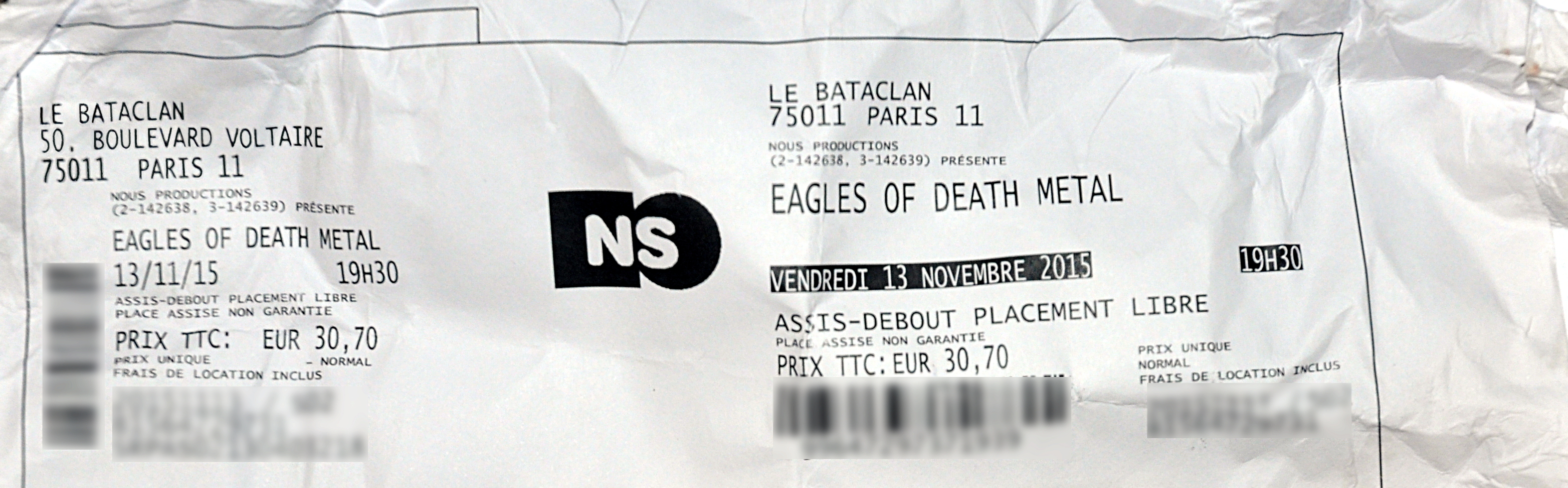 Détail d'un billet d'entrée pour le concert du groupe "Eagles of Death Metal" au Bataclan, le vendredi 13 novembre 2015. Les éléments d'identification ont été floutés.